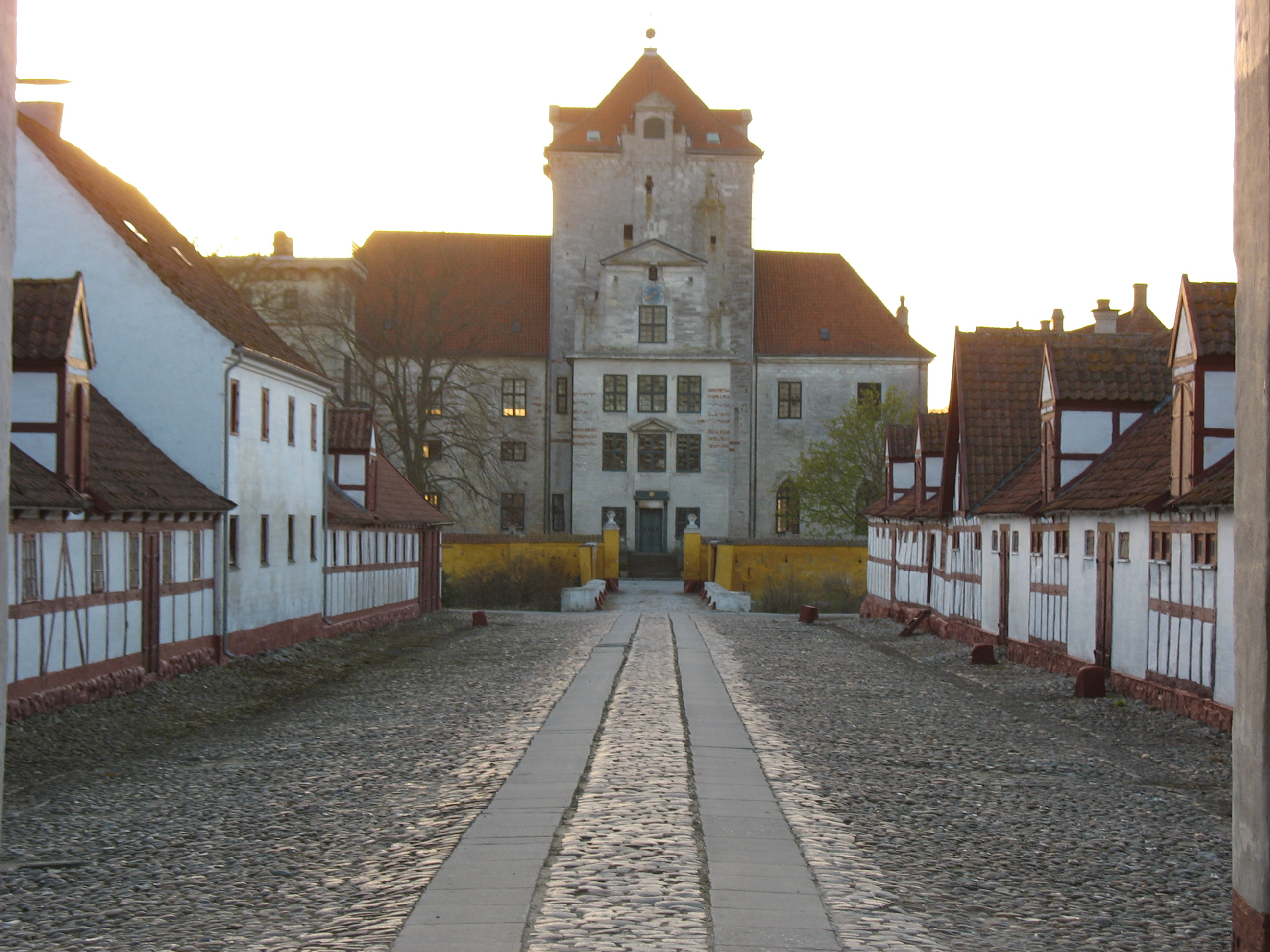 Den gamle gade ved Gjorslev Slot